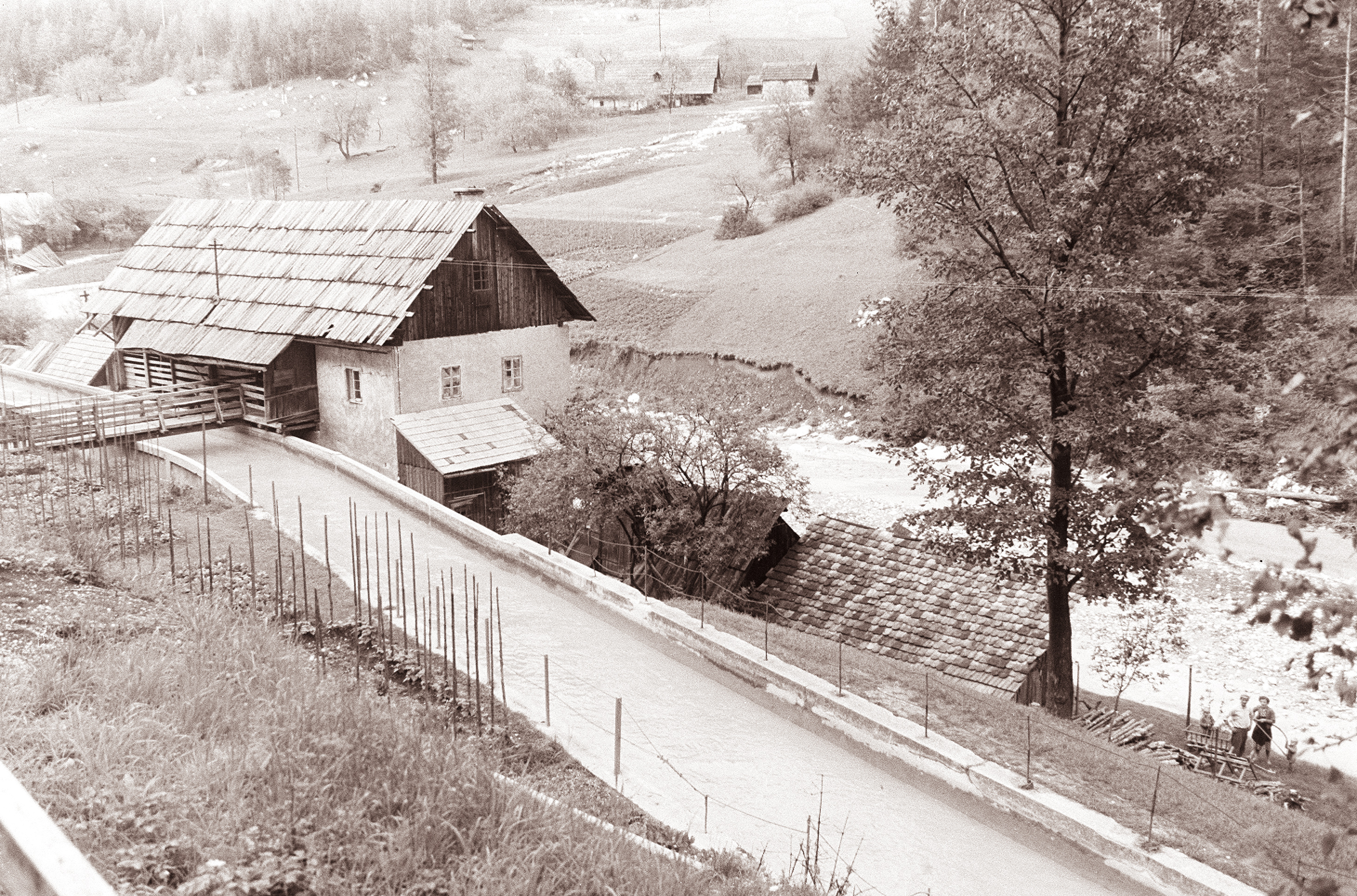 Mežiška dolina